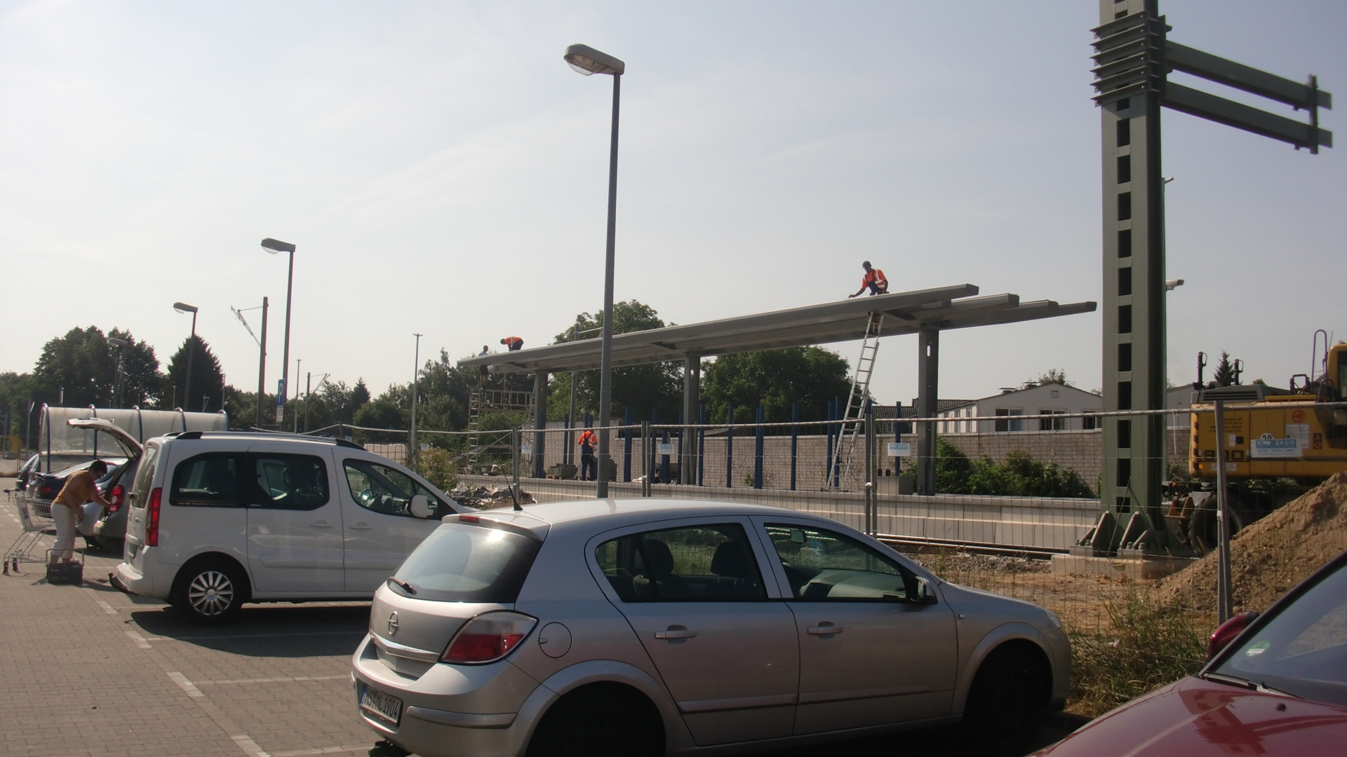 Bahnhofsbereich im Juli 2013.